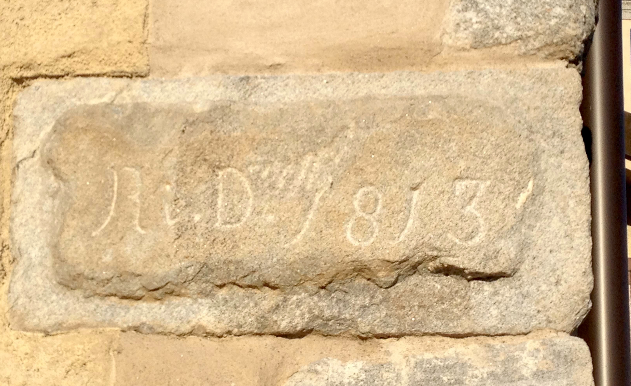 Pietra d'angolo della chiesa di San Maffeo portante inciso l'anno 1813, a ricordo dell'inizio dei primi restauri.